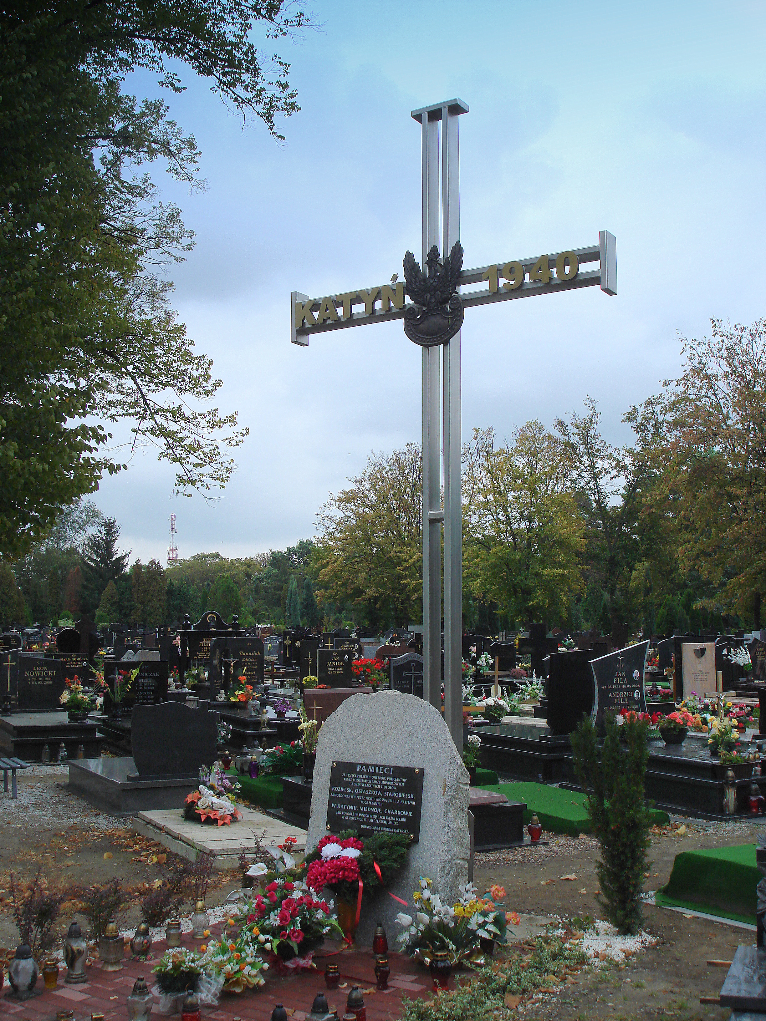 Cmentarz Ducha Świętego przy ul. Bardzkiej we Wrocławiu